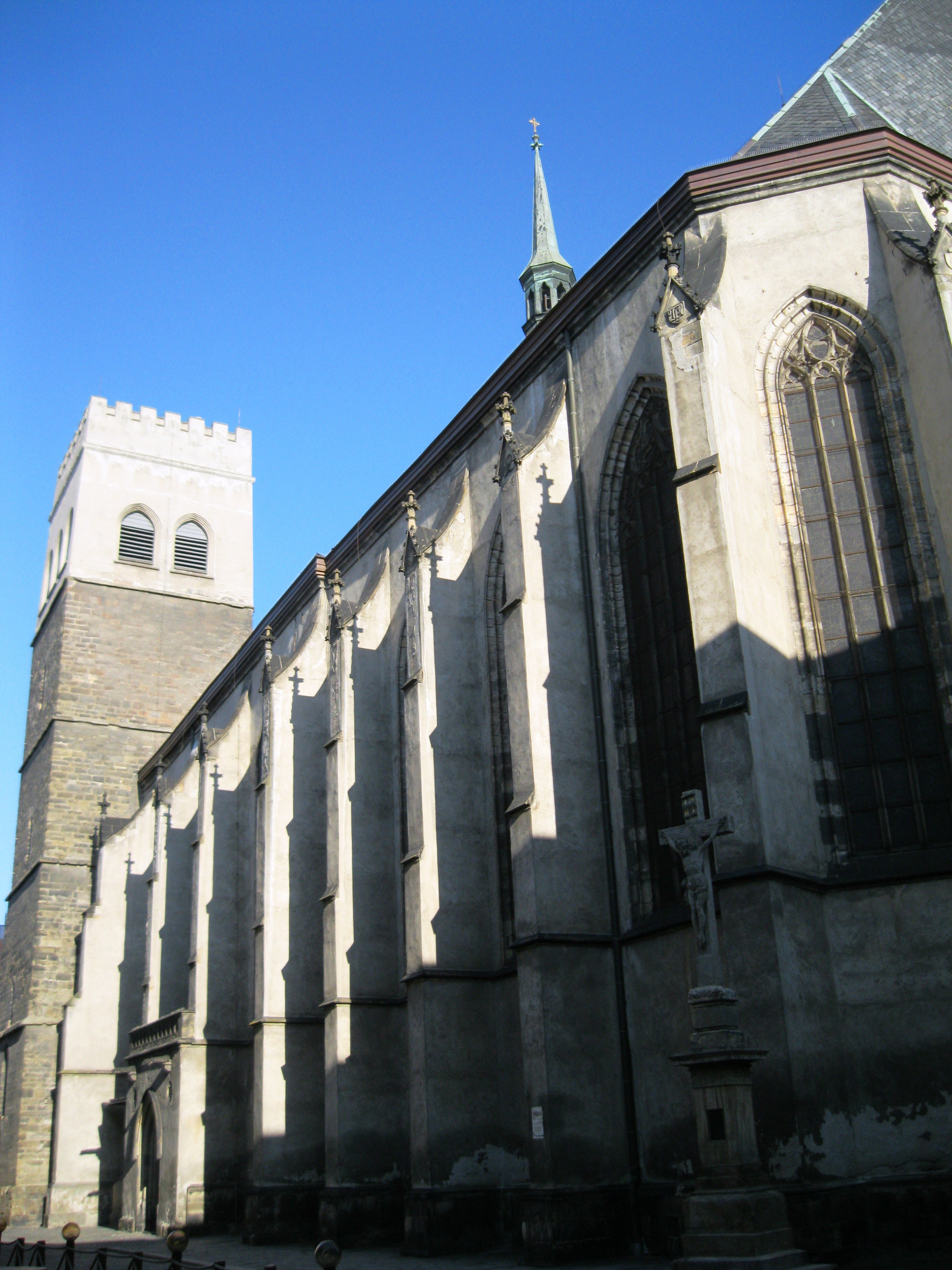 Kostel sv. Mořice (Olomouc), 8. května, Olomouc